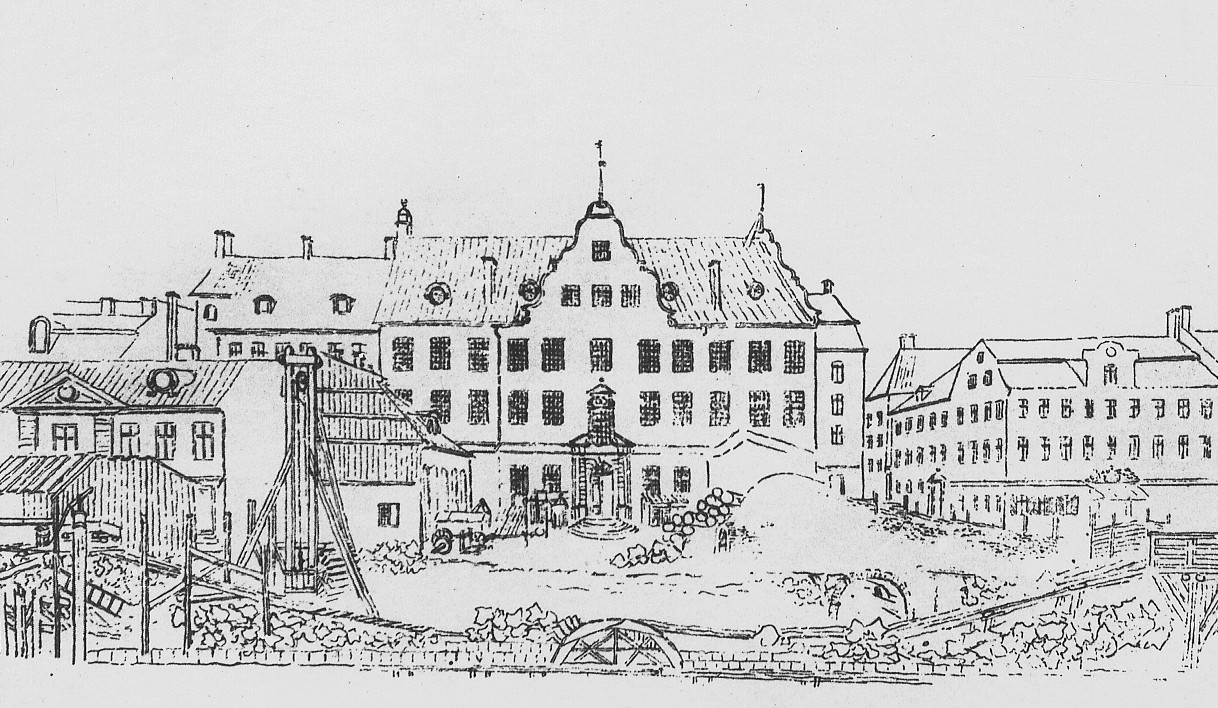 Torstensonska palatset sett från Norrström